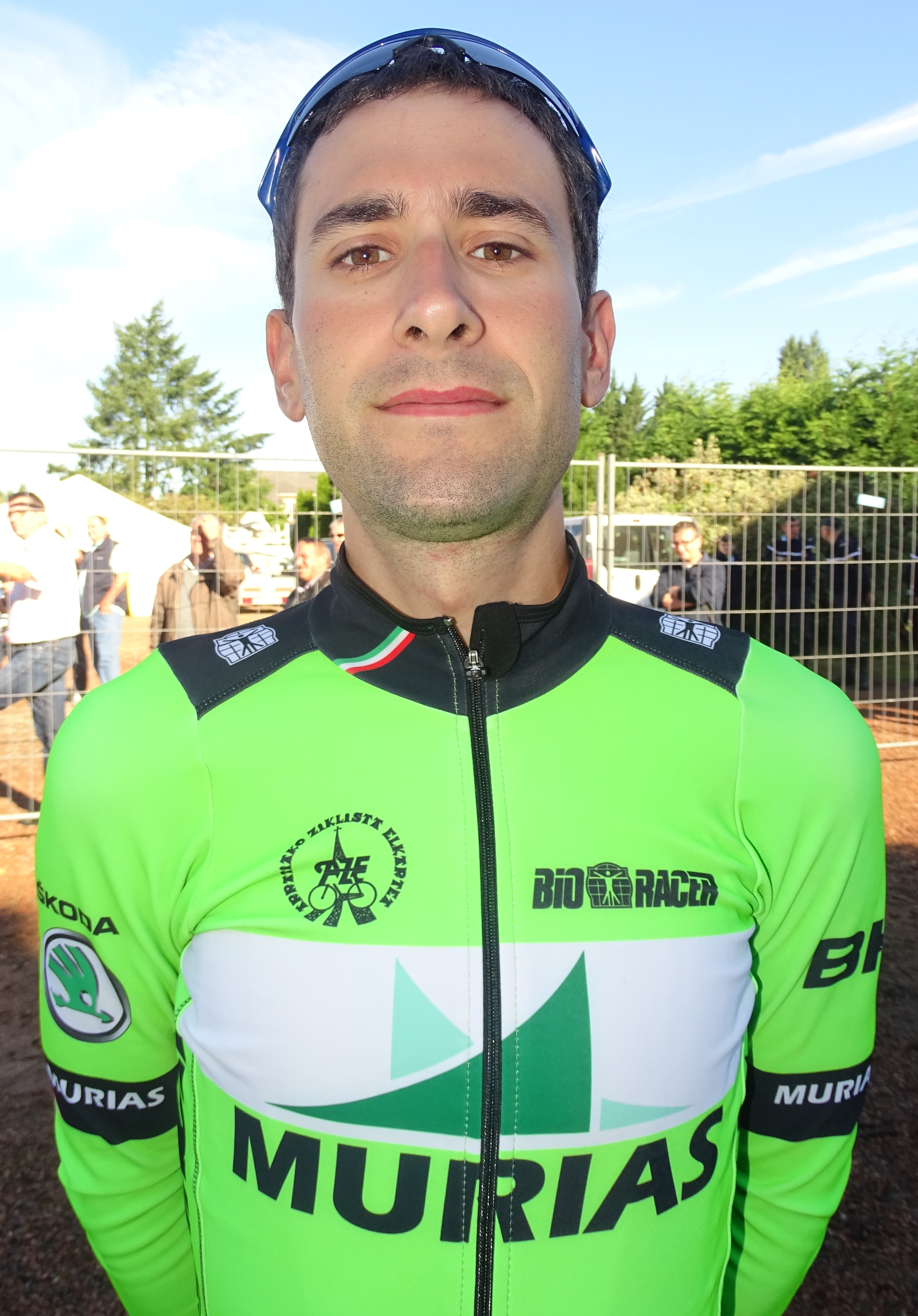 Reportage réalisé le dimanche 20 septembre à l'occasion du départ et de l'arrivée du Grand Prix d'Isbergues 2015 à Isbergues, Nord-Pas-de-Calais, France.